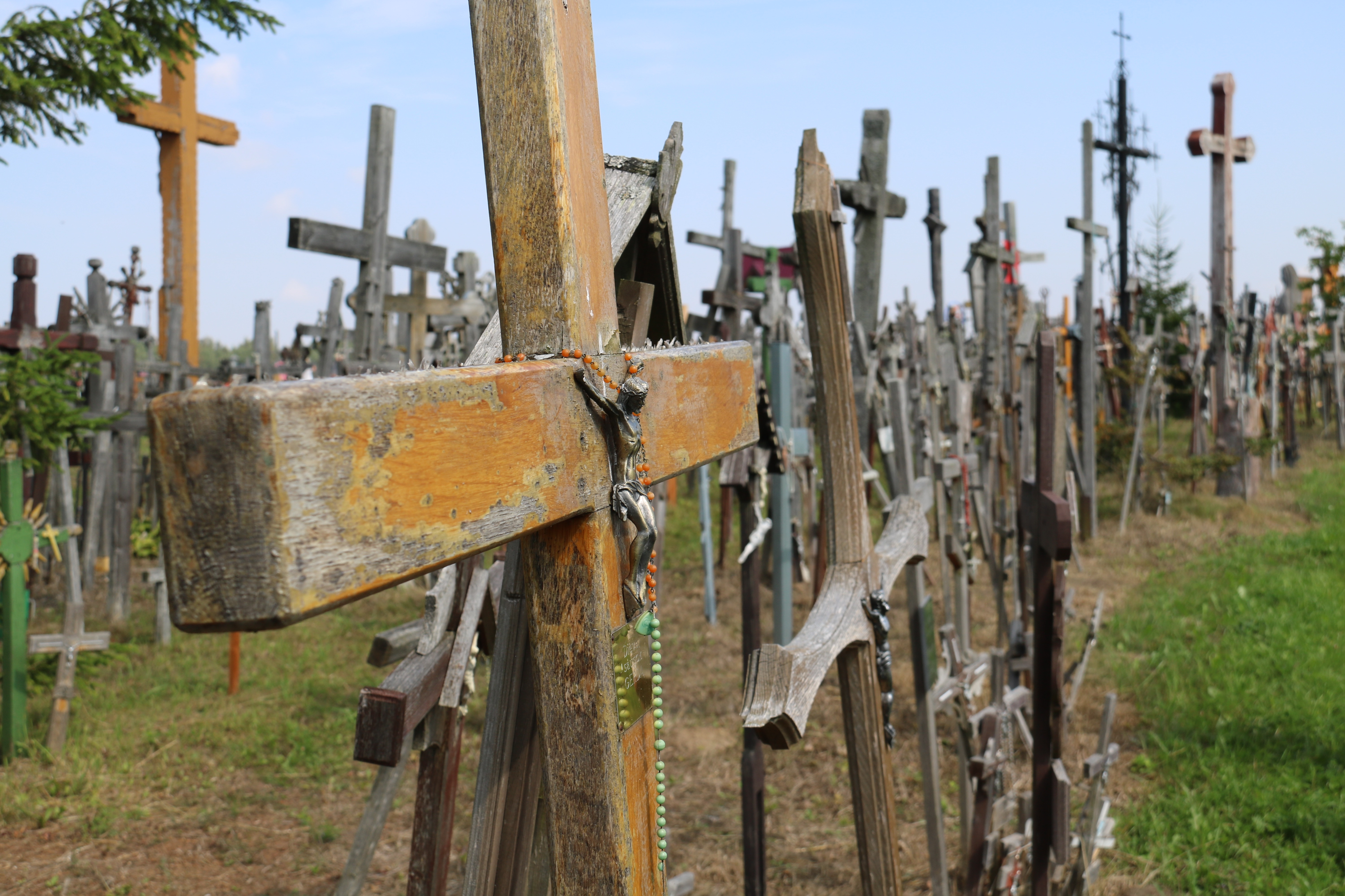 Hill of Crosses